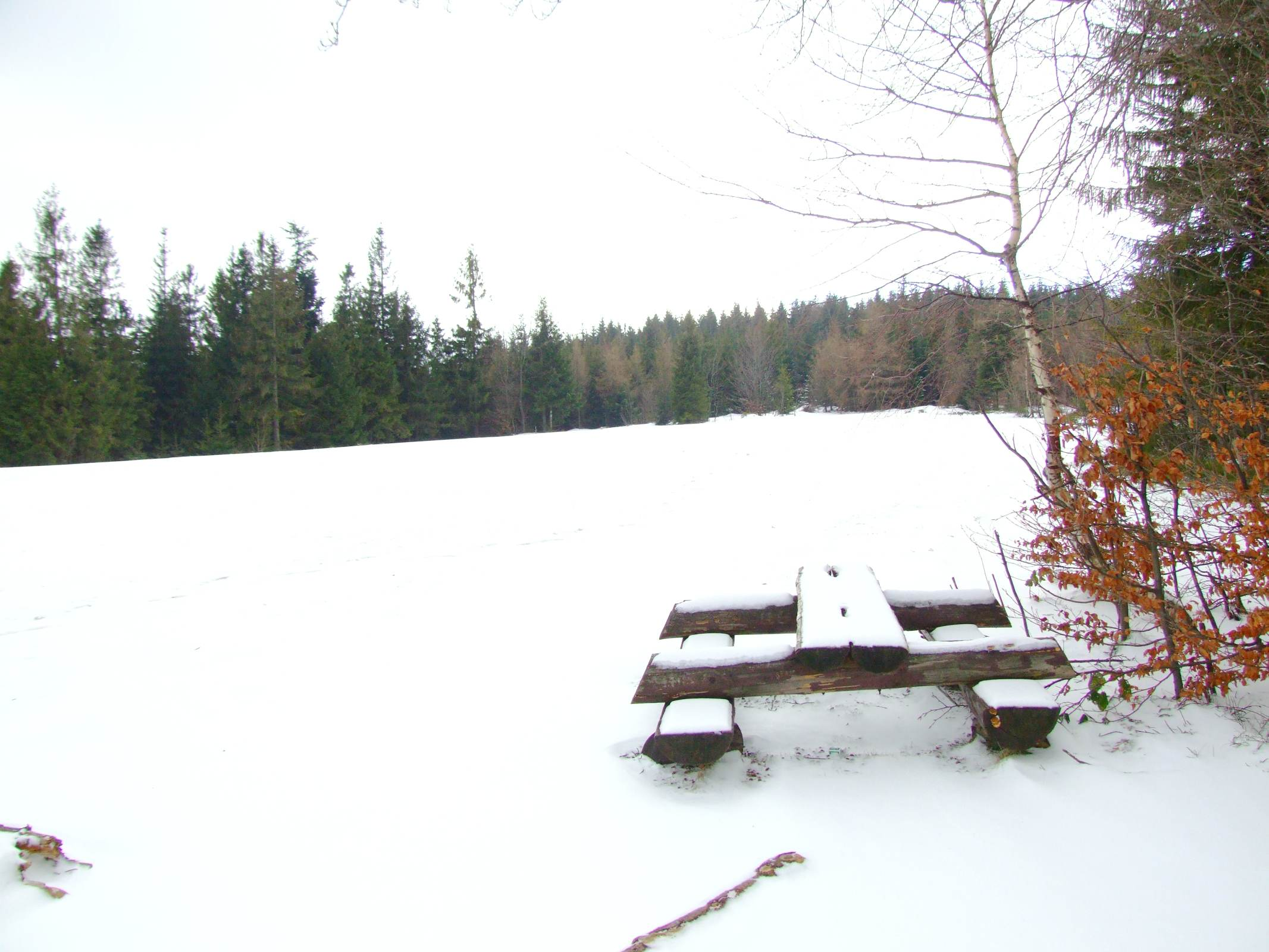 Polana Myconiówka na Łopieniu